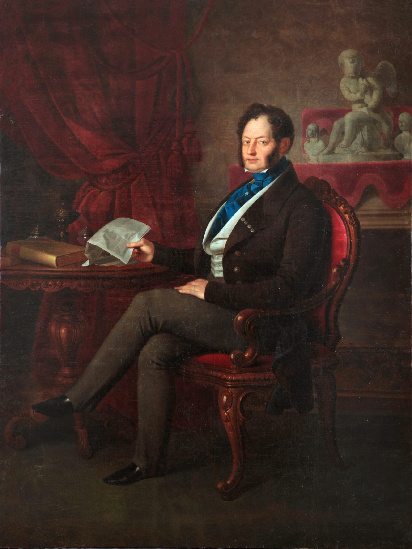 Беларуская (тарашкевіца): Партрэт Міхала Клеафаса Агінскага (Michał Kleafas Aginski)